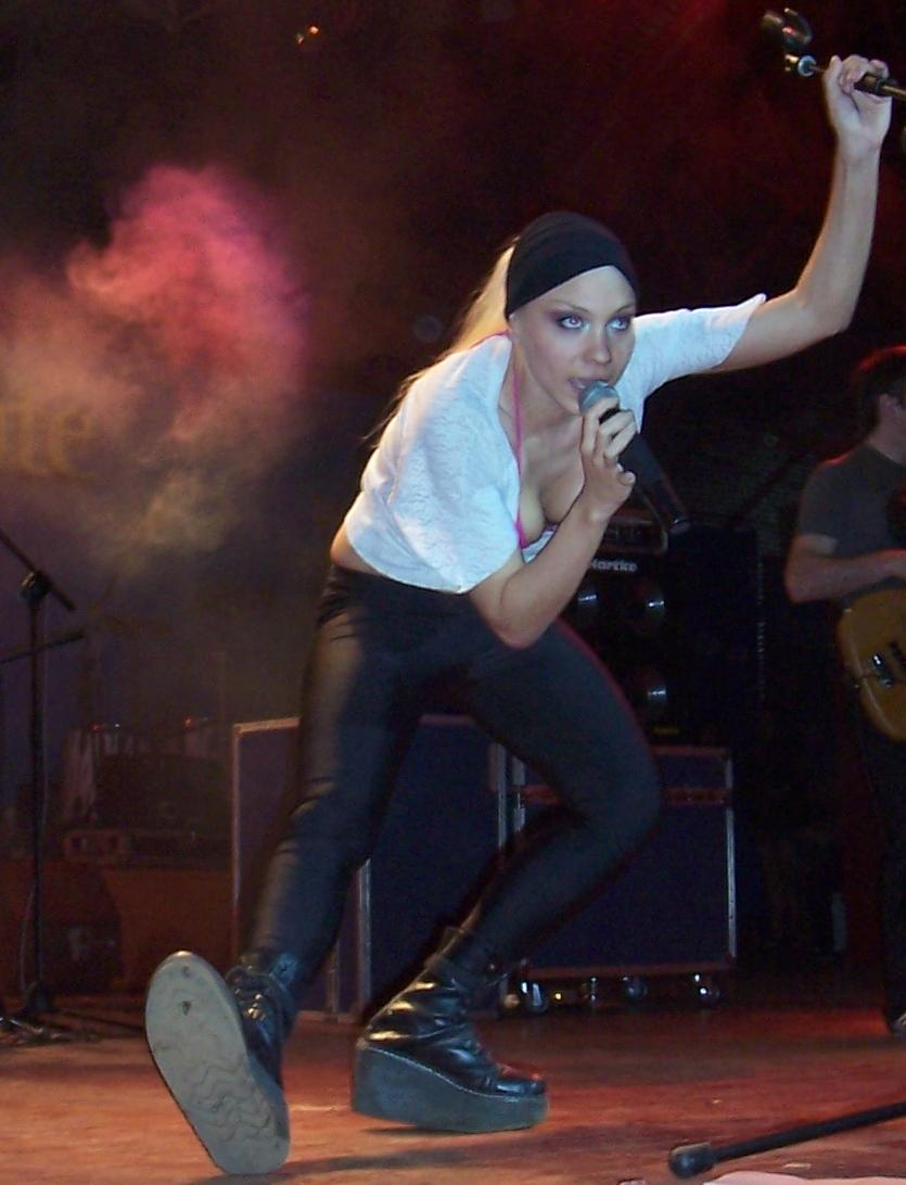 Lourdes, ex integrante del grupo banda, brindando un recital en la Fiesta Nacional del Inmigante, Oberá, Misiones.